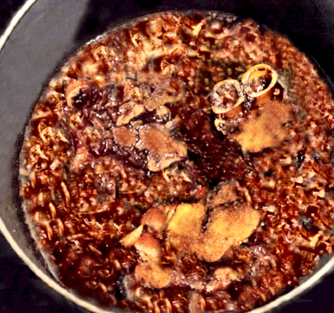 Schweinsfüße mit Nelkenschwindlingen katalanisch, Tossa de Mar 1971